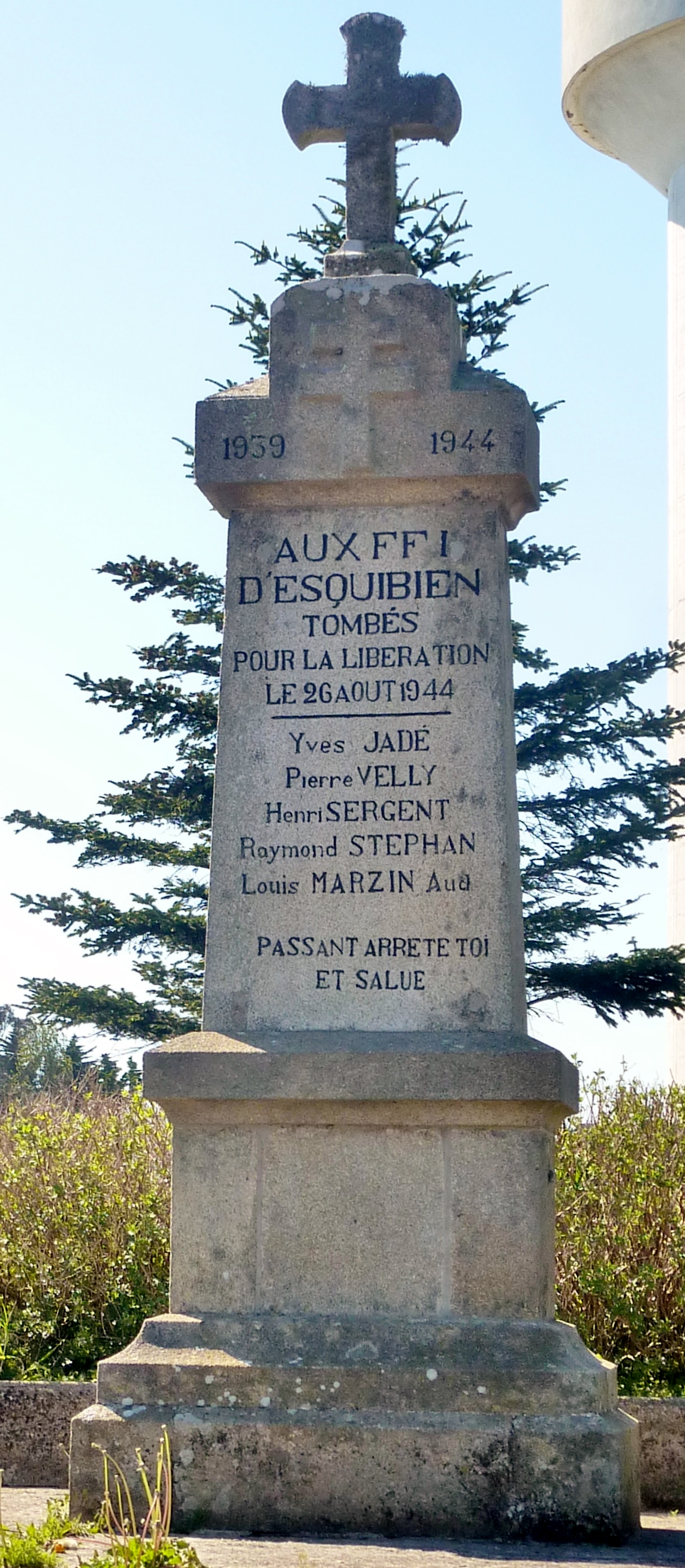 Le monument à la mémoire des combattants FFI d'Esquibien.